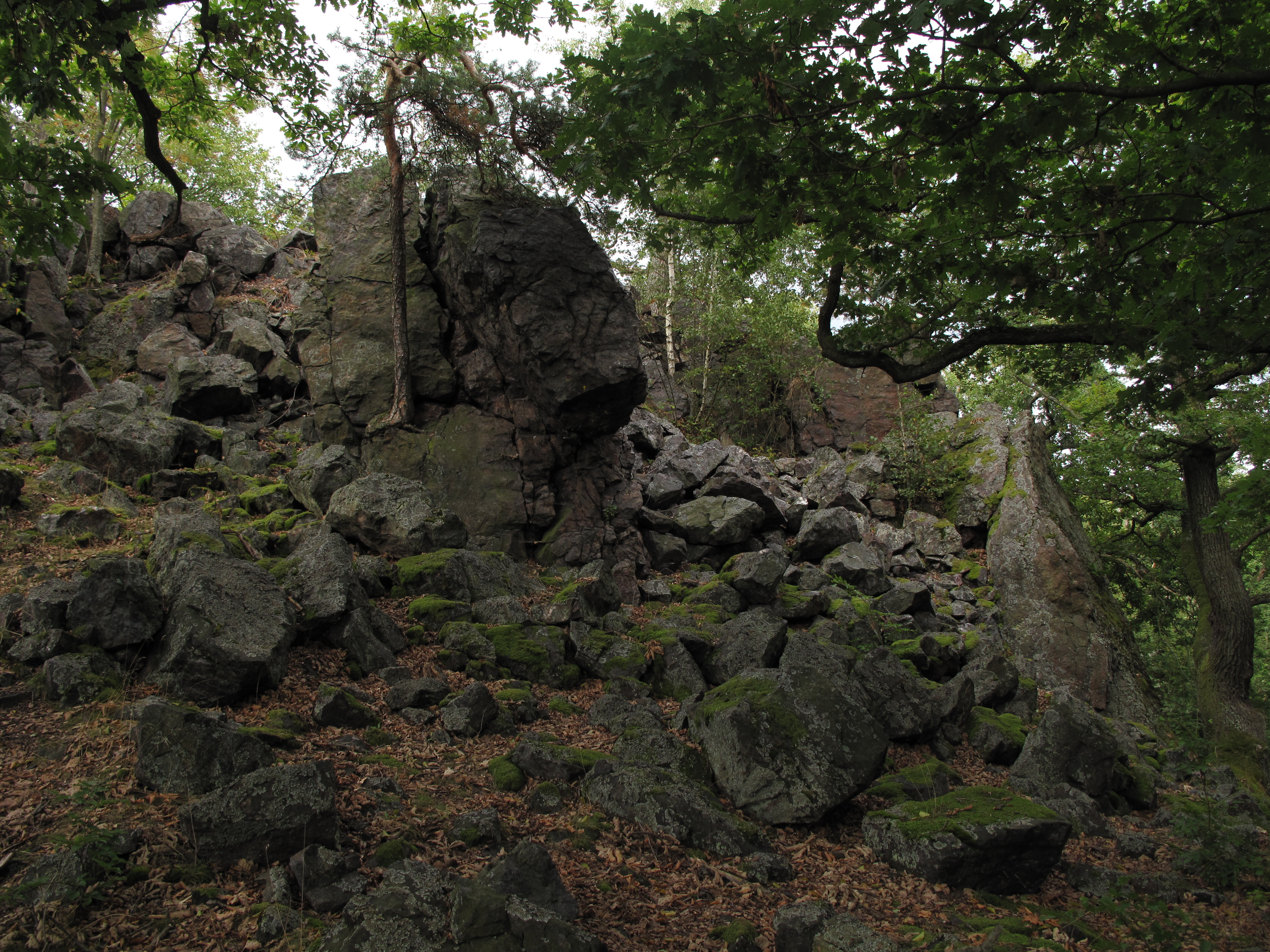 Skalka v přírodní rezervaci Jouglovka. Okres Beroun, Česká republika.